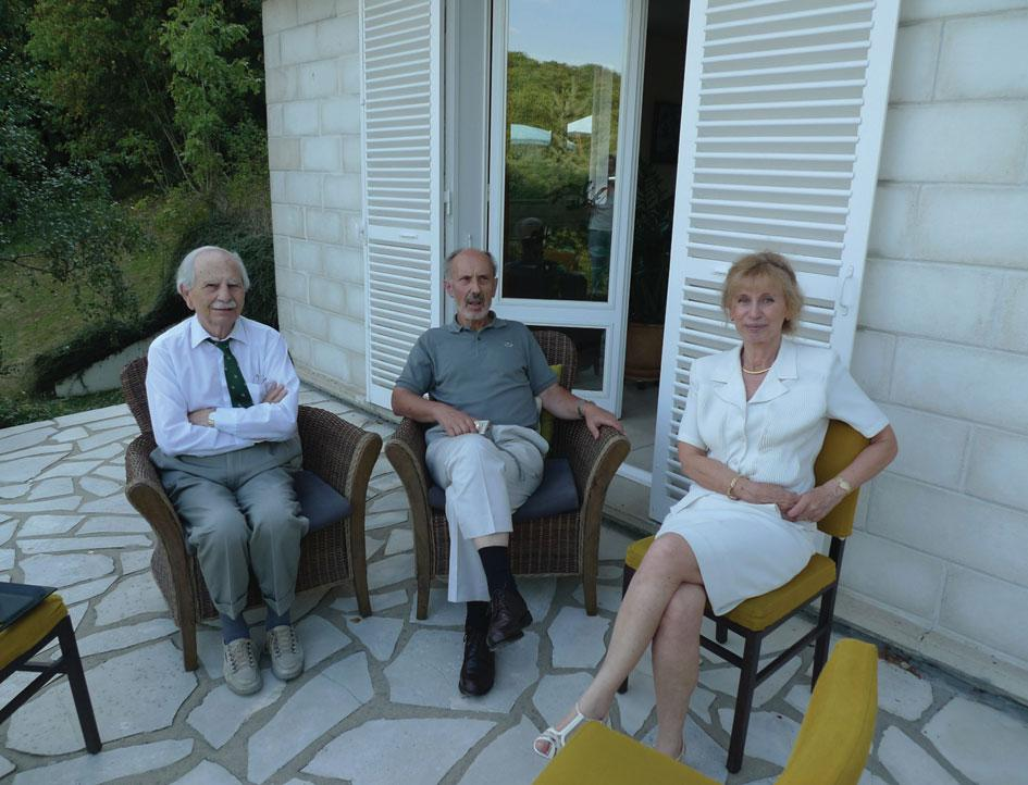 Анатоль, Дени Жером и Нина Абрагам в 2009 году